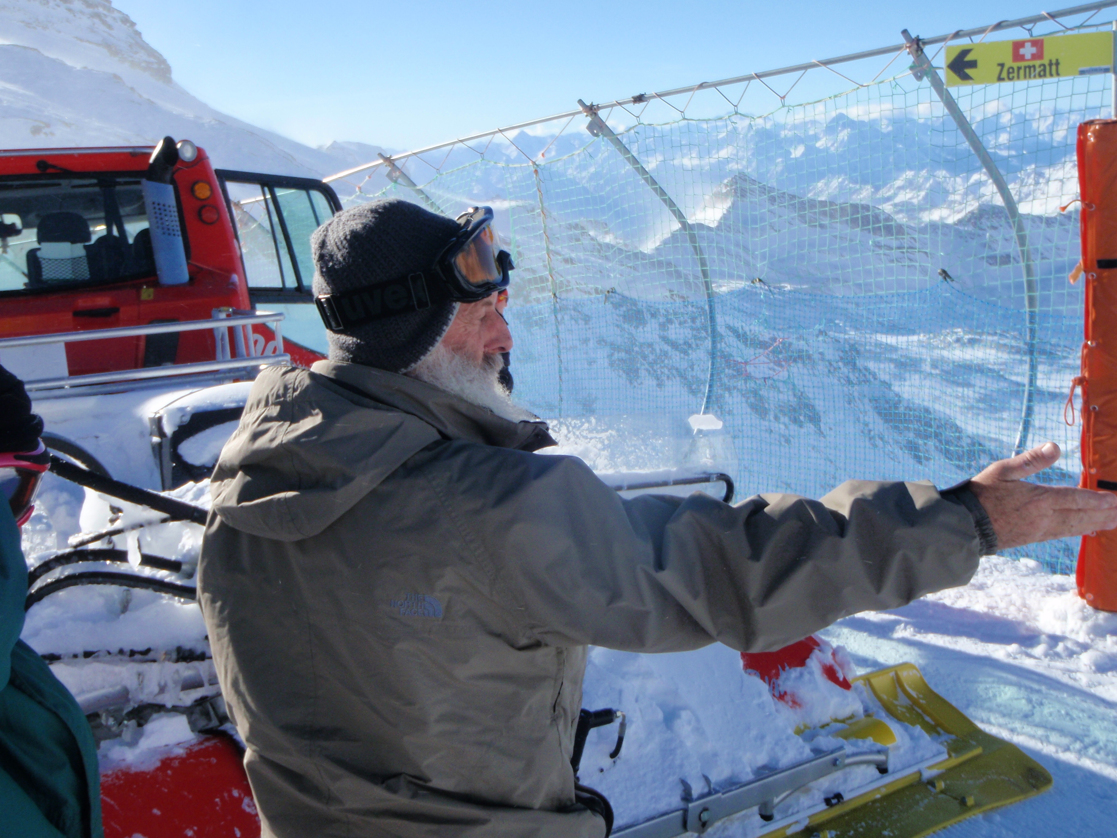 Hilik Magnus - חיליק מגנוס